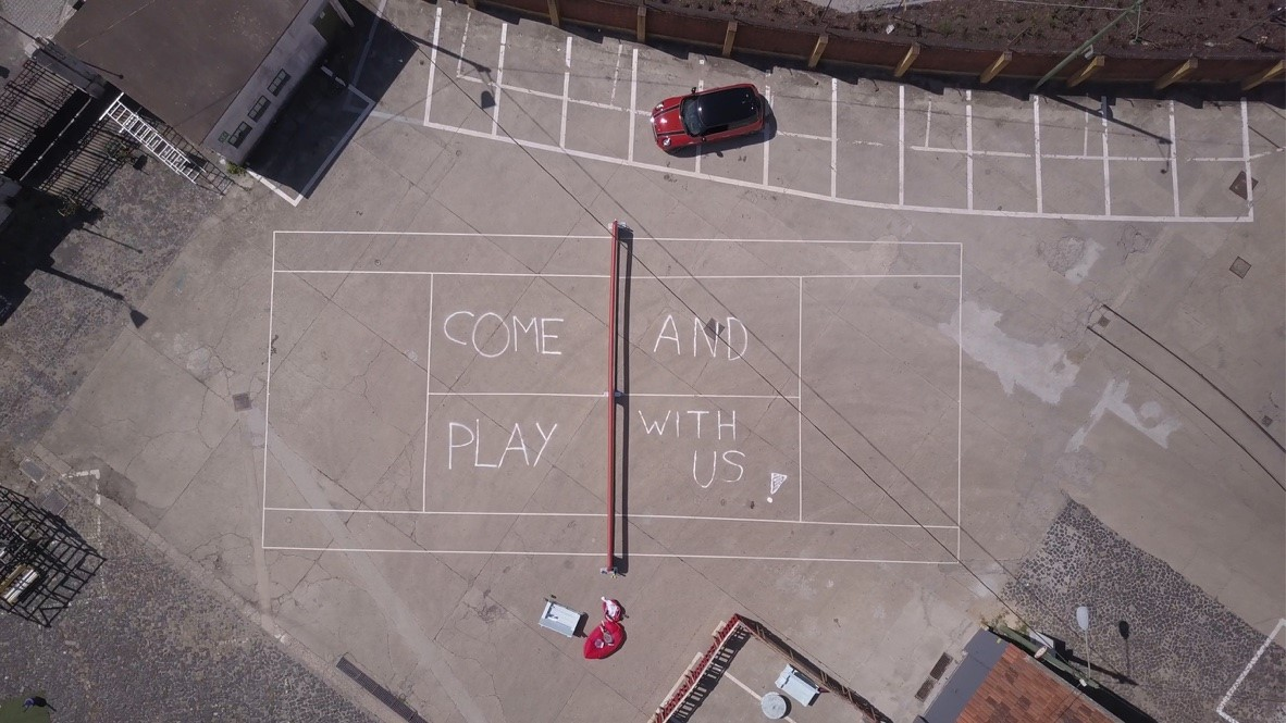 Urban Tennis Event in einem Hinterhof in Lissabon, Portugal